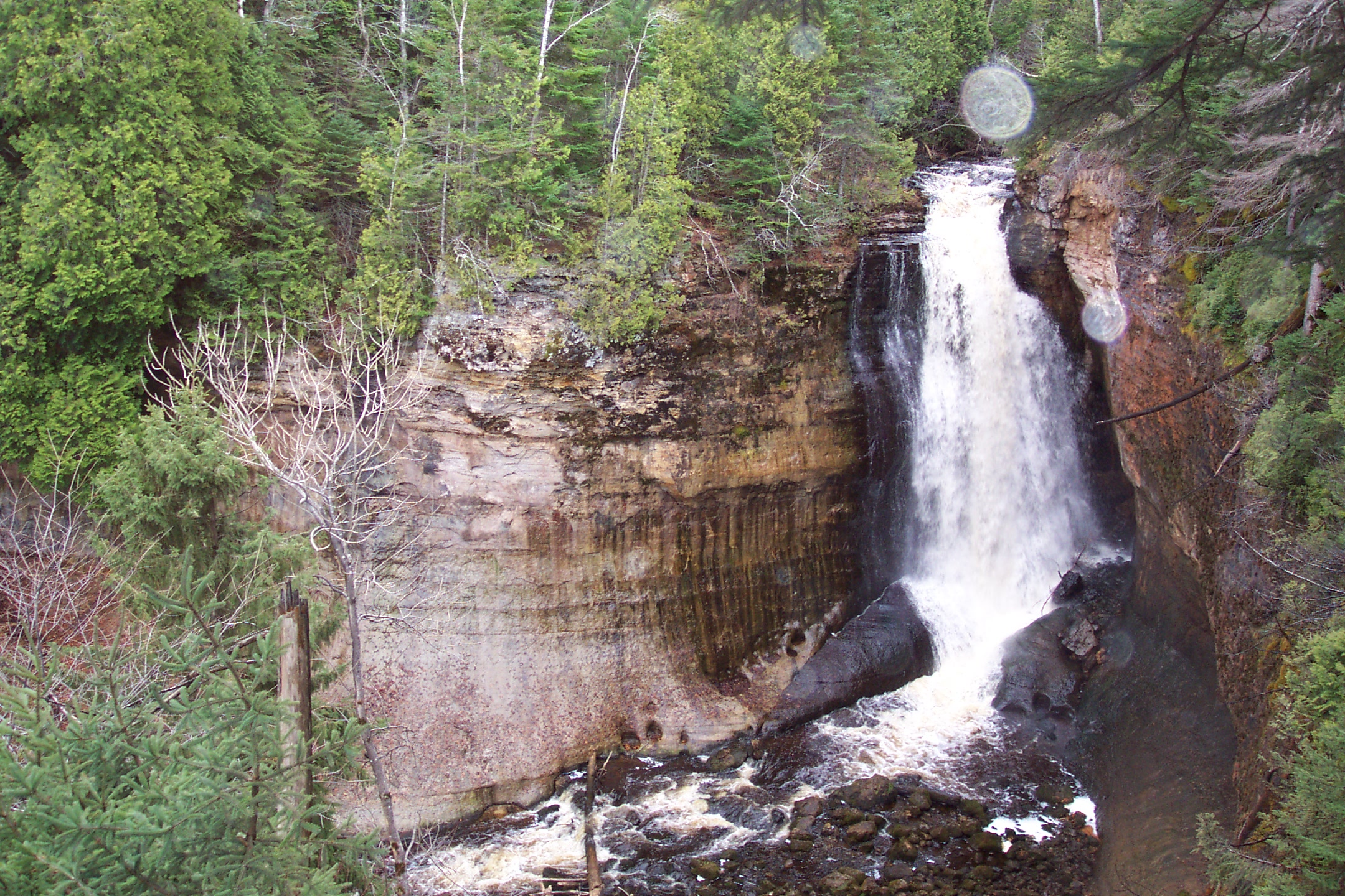 Miners' Falls in Michigan